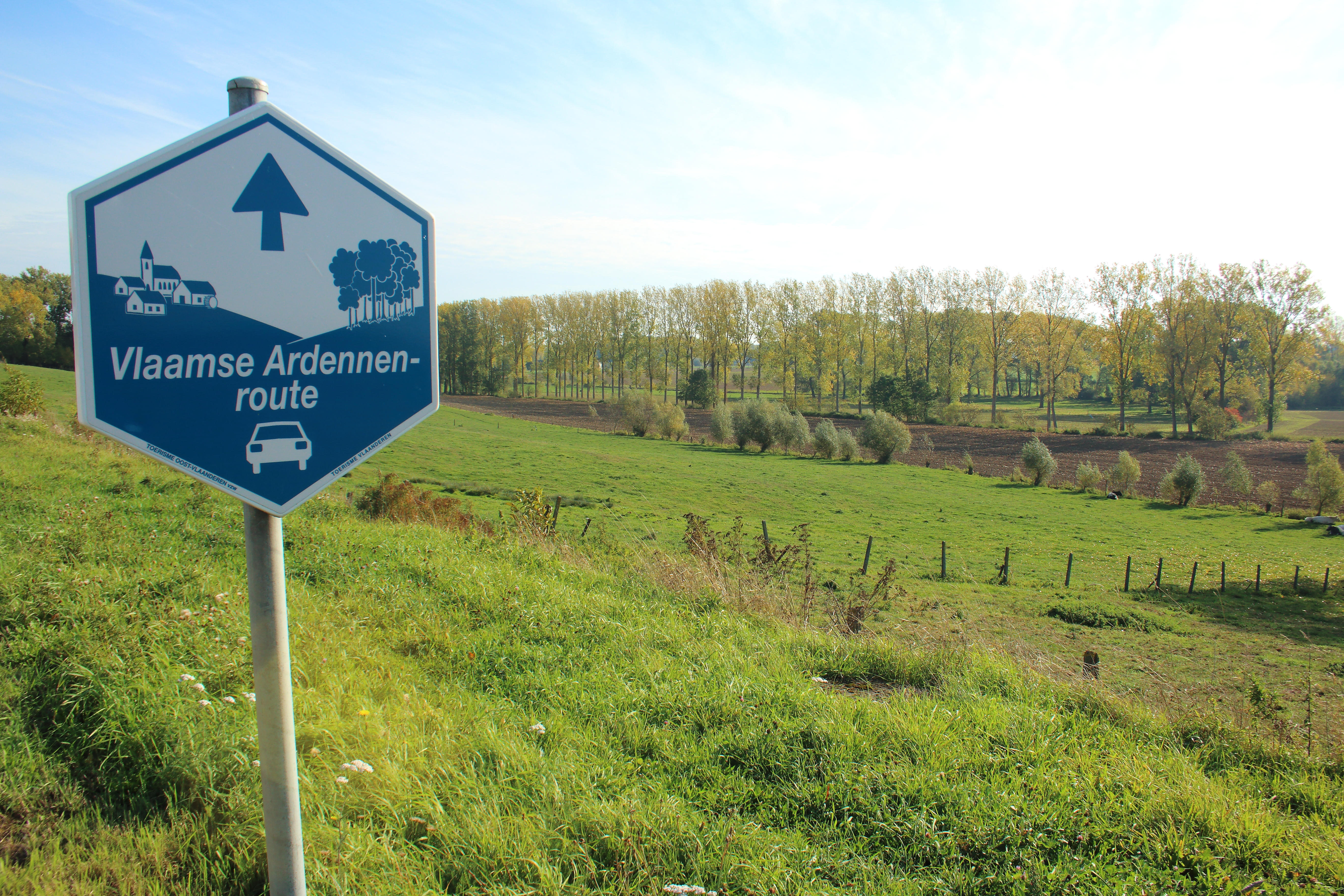 Vlaamse Ardennenroute, Strijpen, Zottegem, Vlaanderen, België